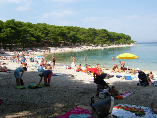 Plaĝo de Primoŝteno Plaĝo ĉe Primoŝten (memfarita foto libere uzebla)